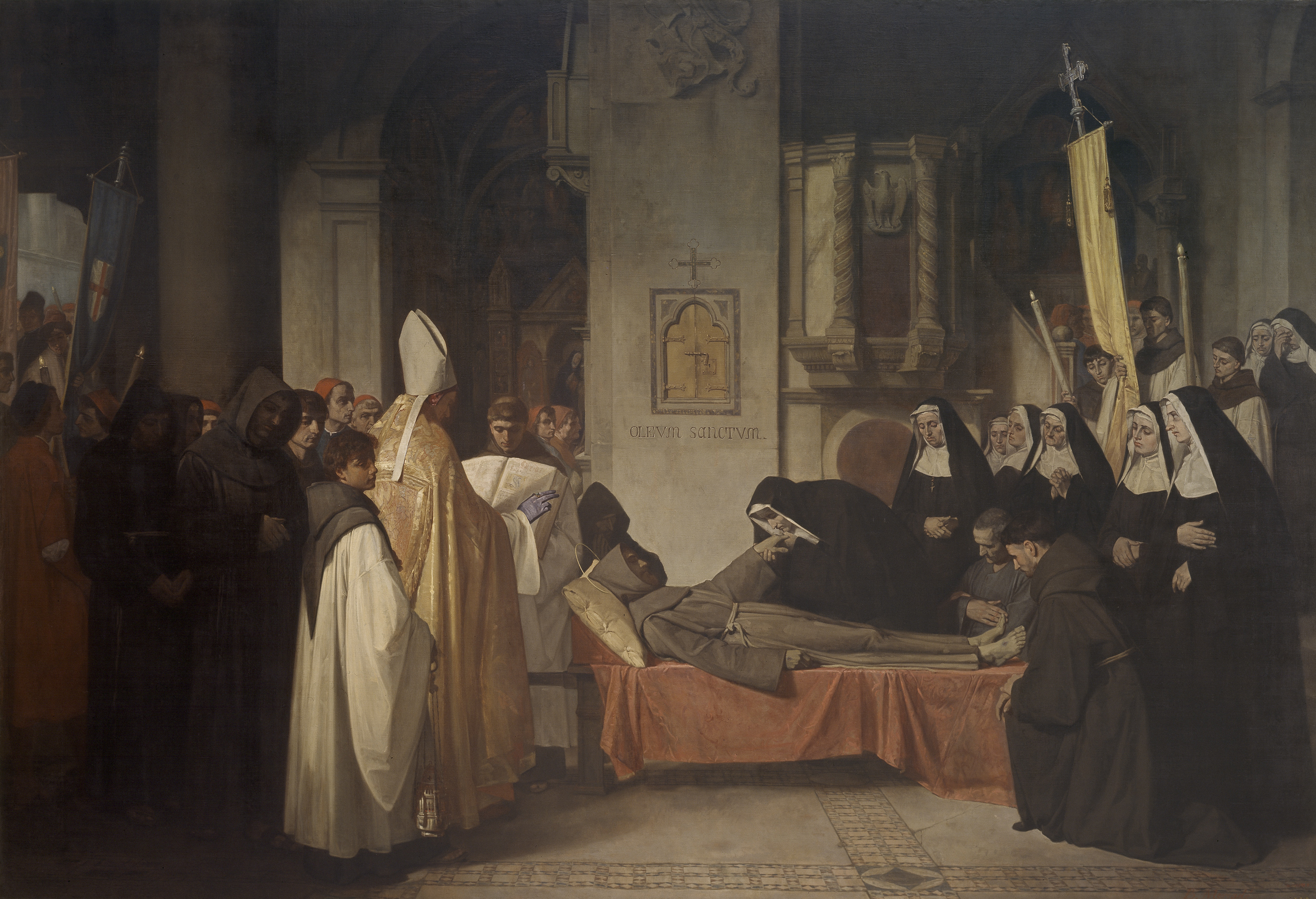 La obra representa la traslación del cadáver de San Francisco de Asís y el momento en que sus restos fueron venerados en la iglesia de San Damián por Santa Clara de Asís y por las monjas que la acompañaban.